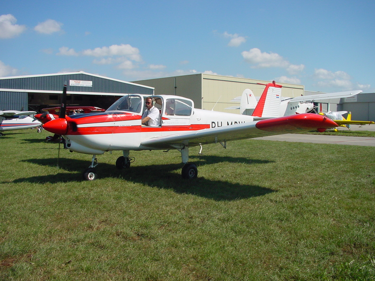 Own work.